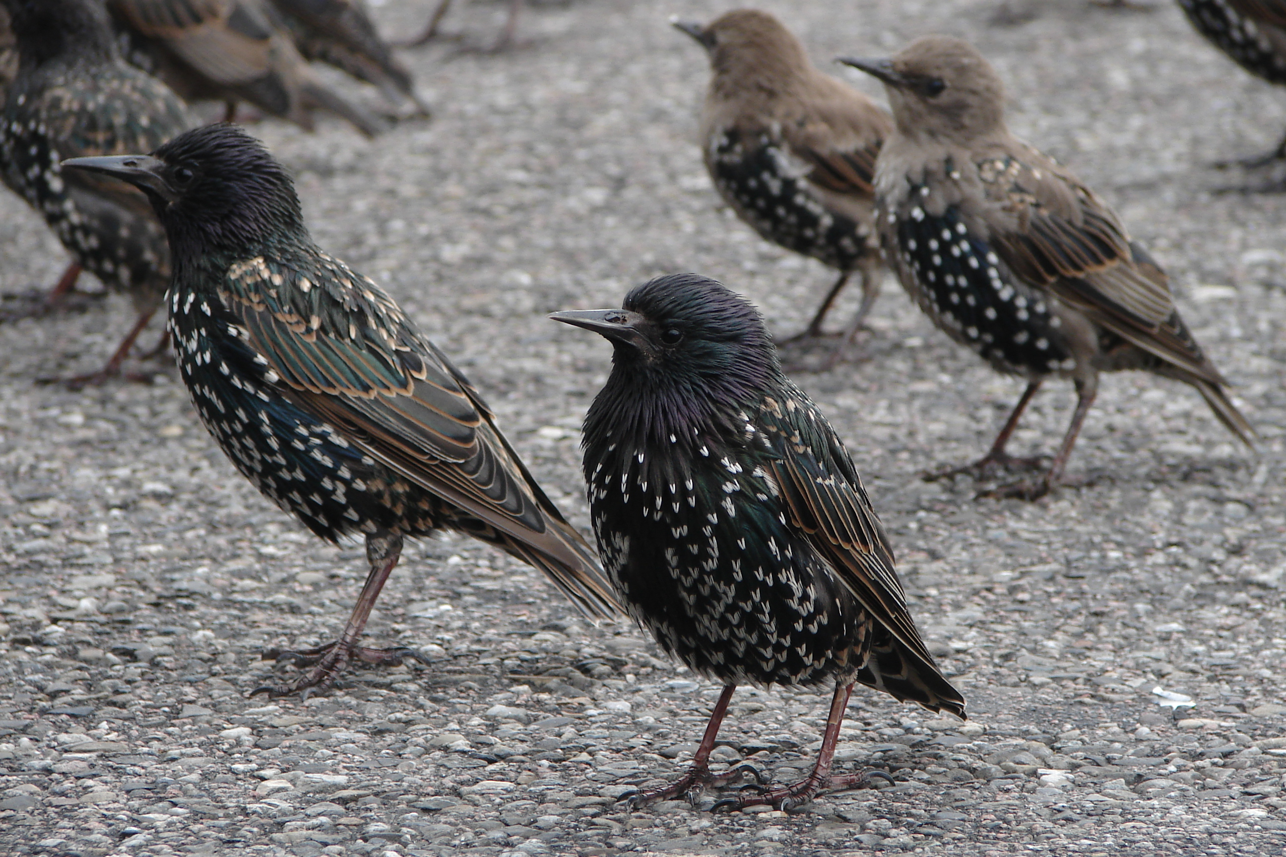 Lieu : Volendam (Hollande) Etourneau sansonnet (Starling) : Sturnus vulgaris